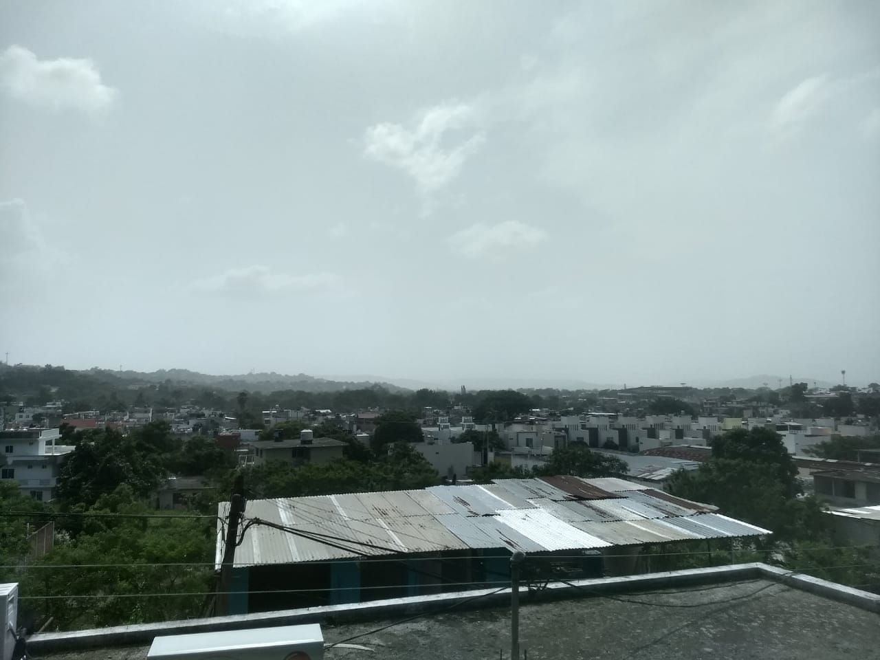 Fotografias de la capa de aire sahariana en Poza Rica.